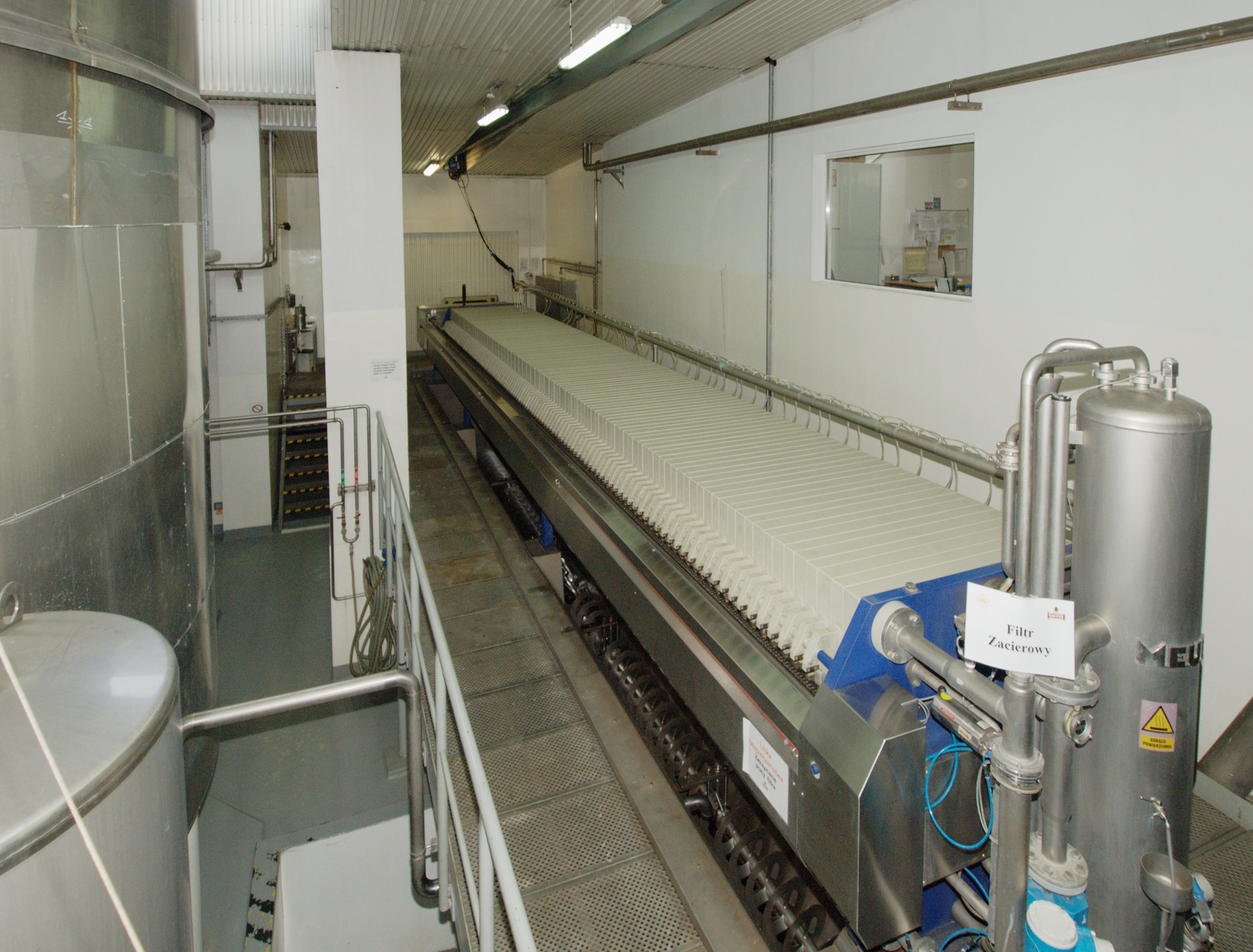 Browary Górnośląskie w Zabrzu. Warzelnia. Prasa filtracyjna.